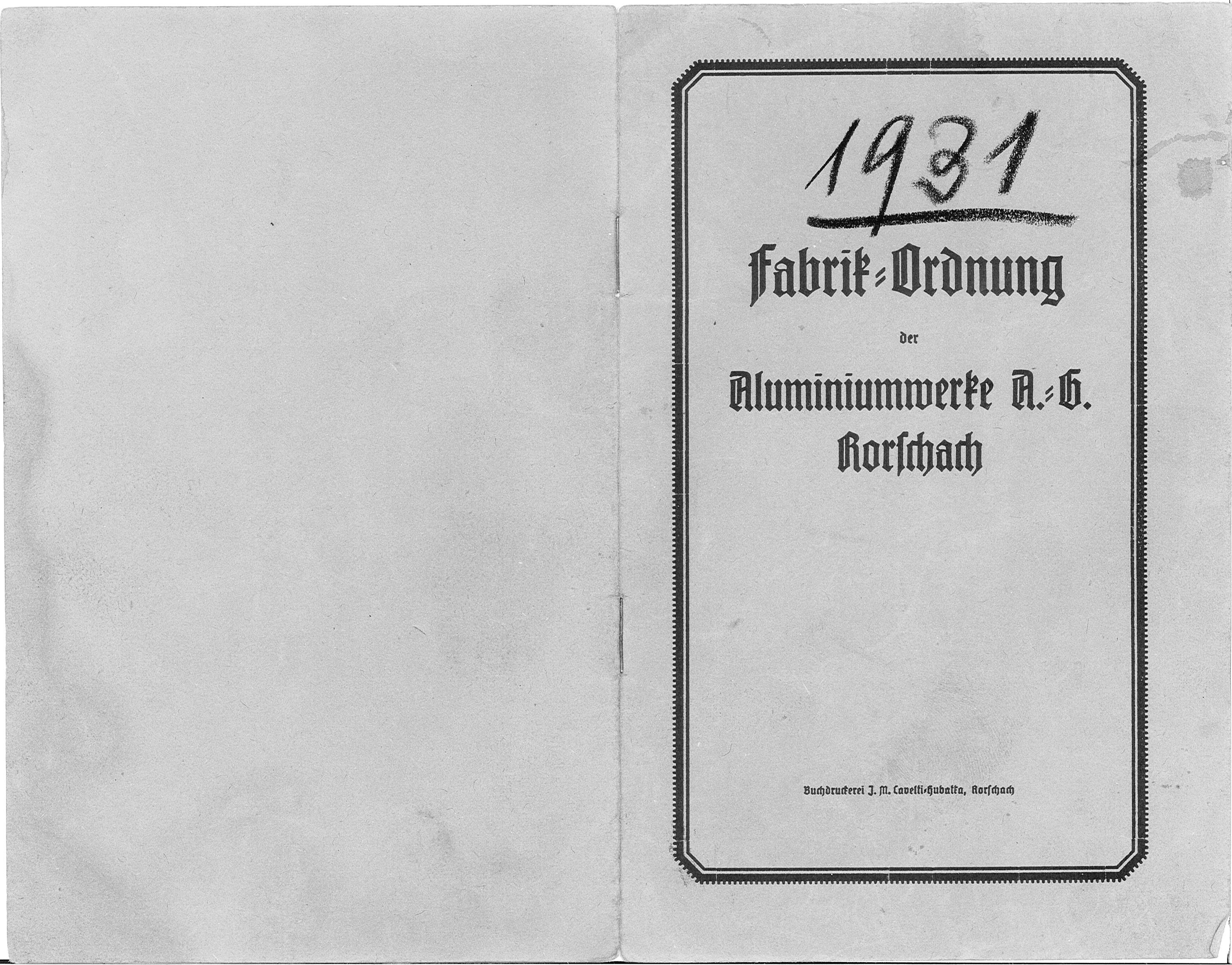 Fabriksordnung der Aluminiumwerke AG (heute ALCAN Packaging) in Rorschach von 1931 in der Schweiz.